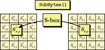 AES S-box